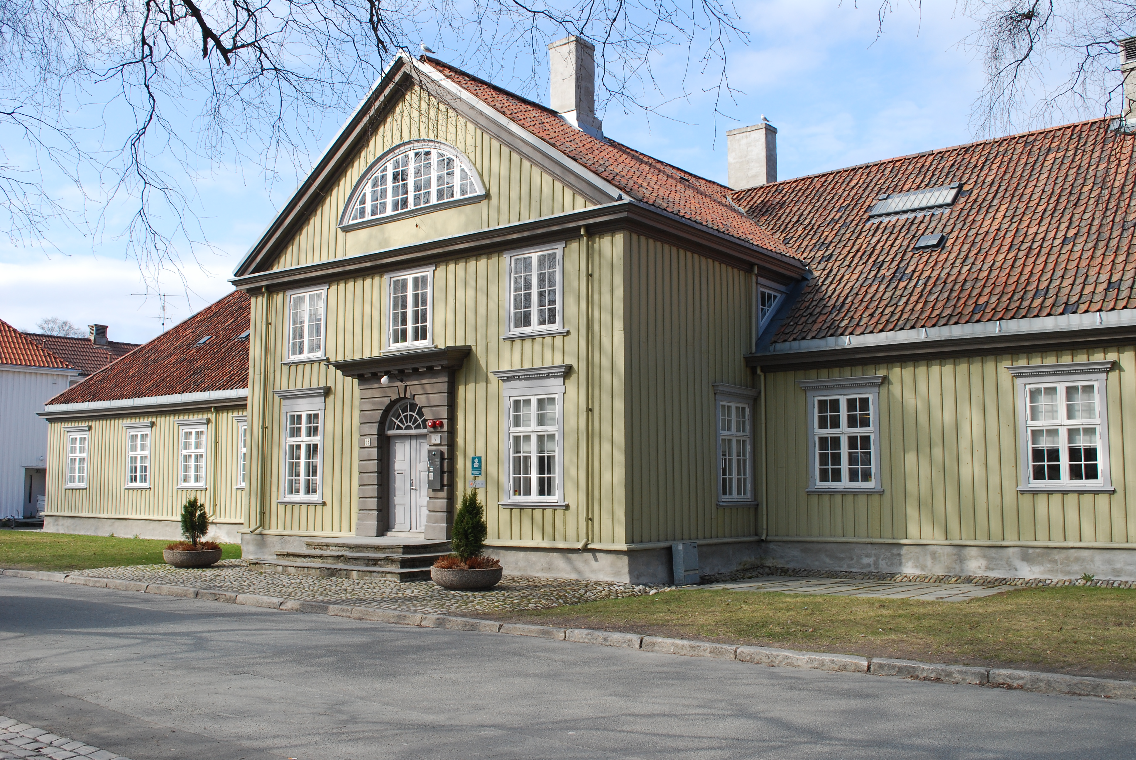 Tronka på Kalvskinnet i Trondheim.